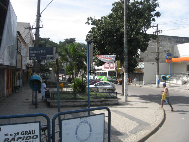 Centro de Belford Roxo